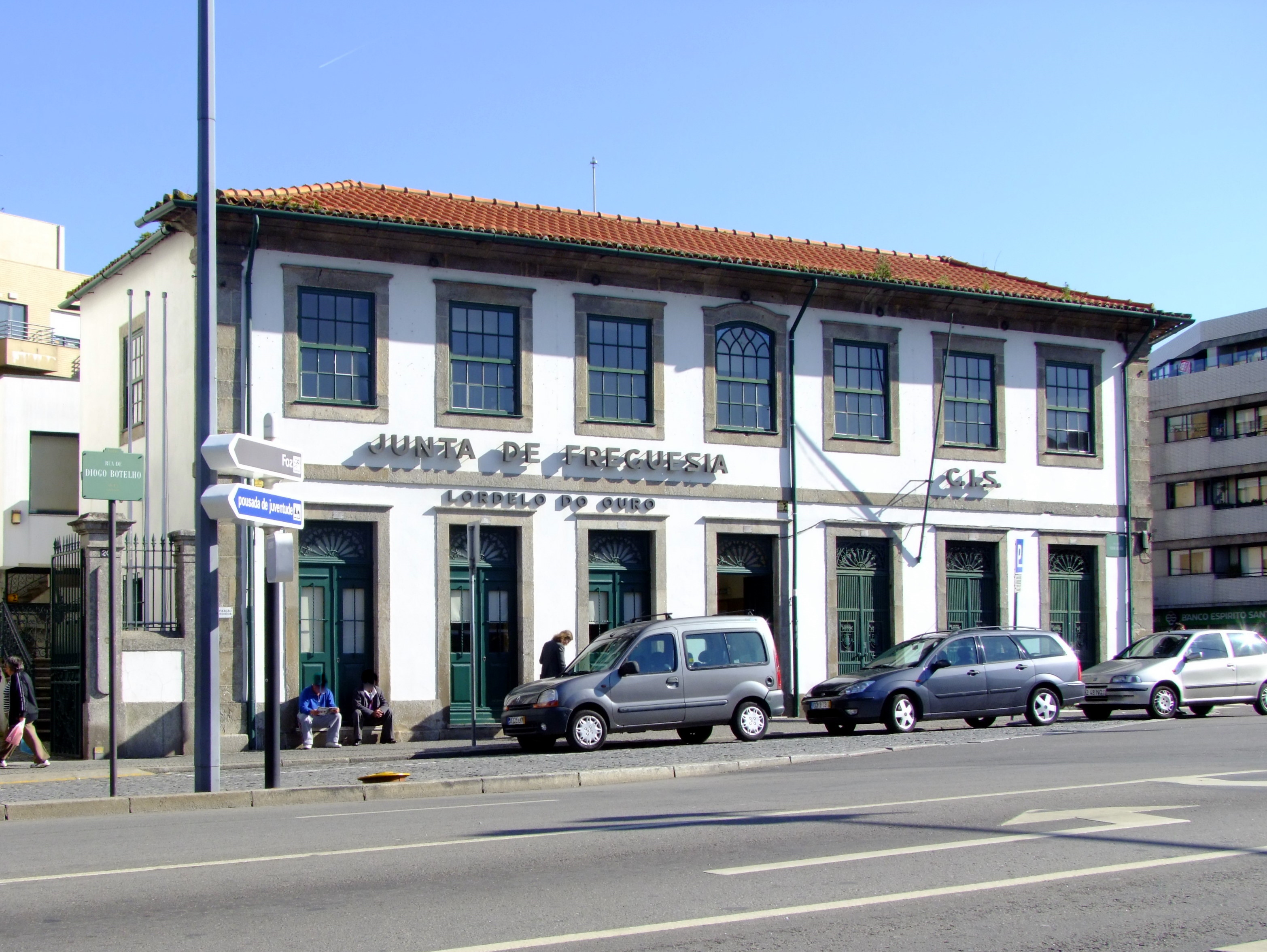 Junta de freguesia de Lordelo do Ouro, Porto.